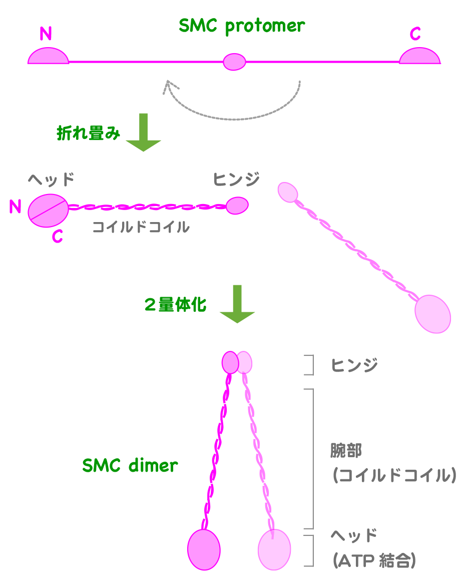 SMC２量体の構造